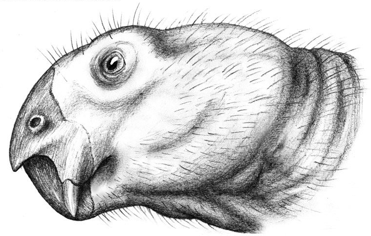 Dicynodont sp. from Voskrosenskoe.